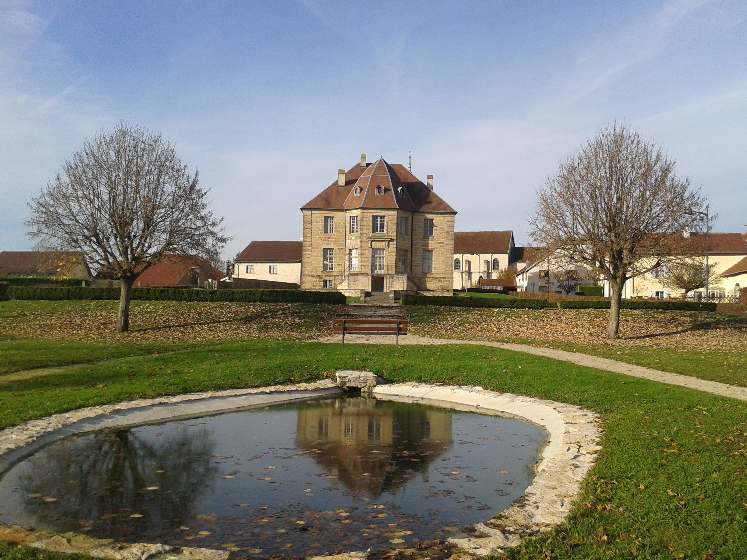 Le château de Pusy (Haute-Saône, Franche-Comté)